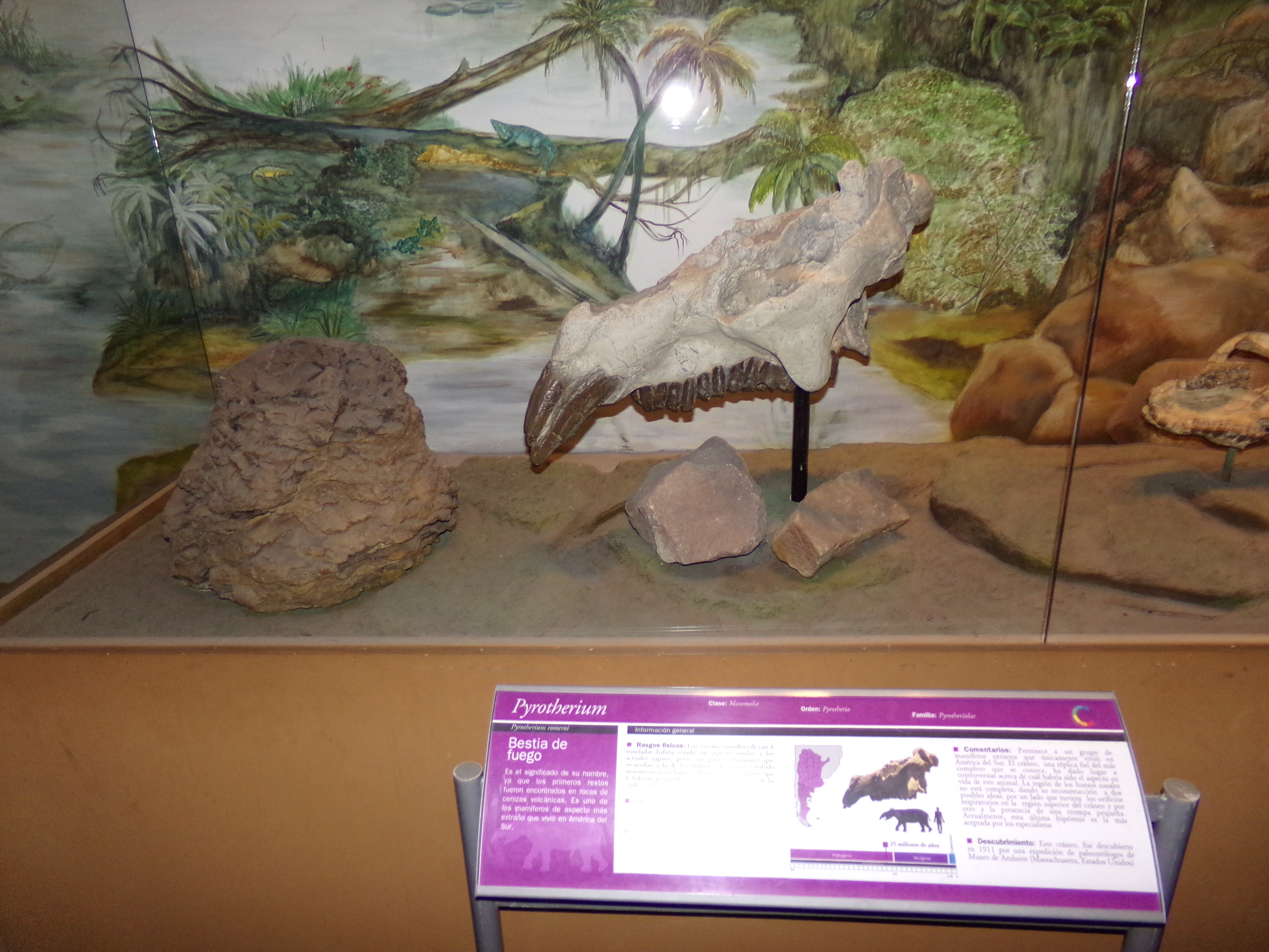 Pyrotherium, MEF Trelew